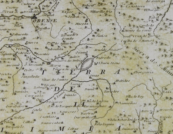 Lagoa de Antela no mapa do bispado de Ourense de Joseph Cornide.